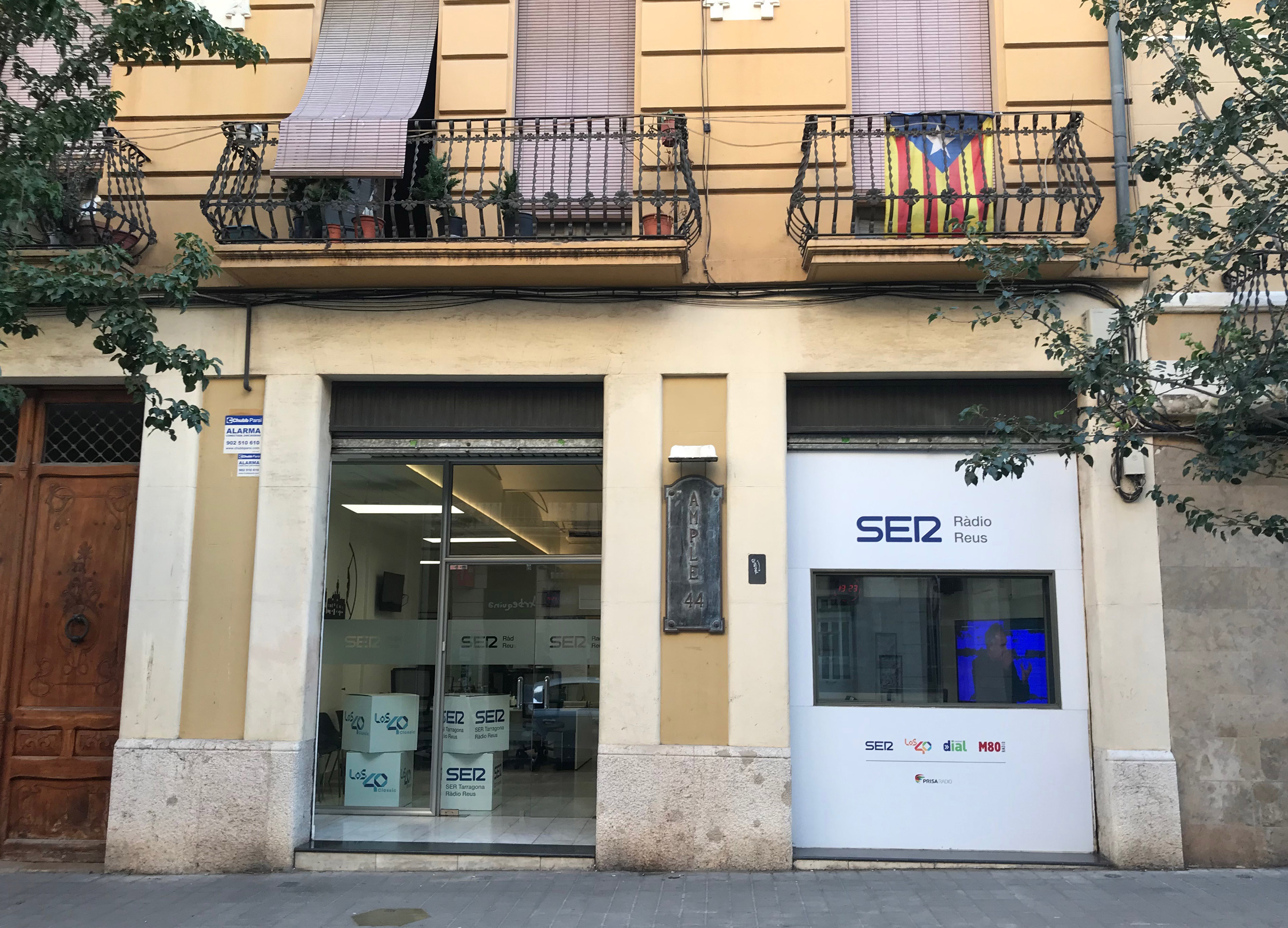 Seu actual de Ràdio Reus, cadena SER. Reus carrer Ample 44. 2019. Casa modernisme tardà. Arquitecte Pere Caselles.